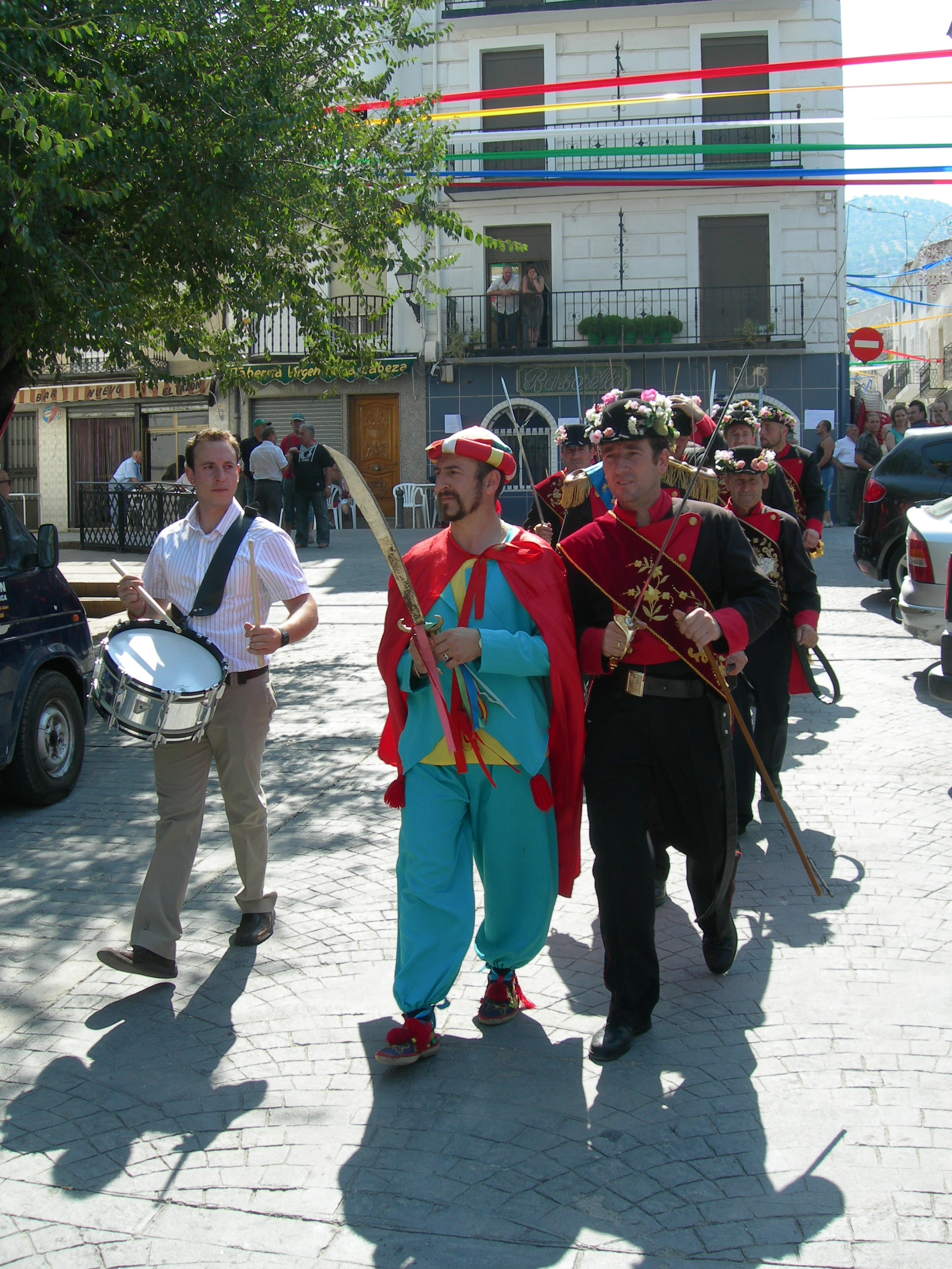 Fiesta de Moros y Cristianos de Campillo de Arenas (Jaén). Desfile tras la conversión del jefe moro en el segundo día de representación